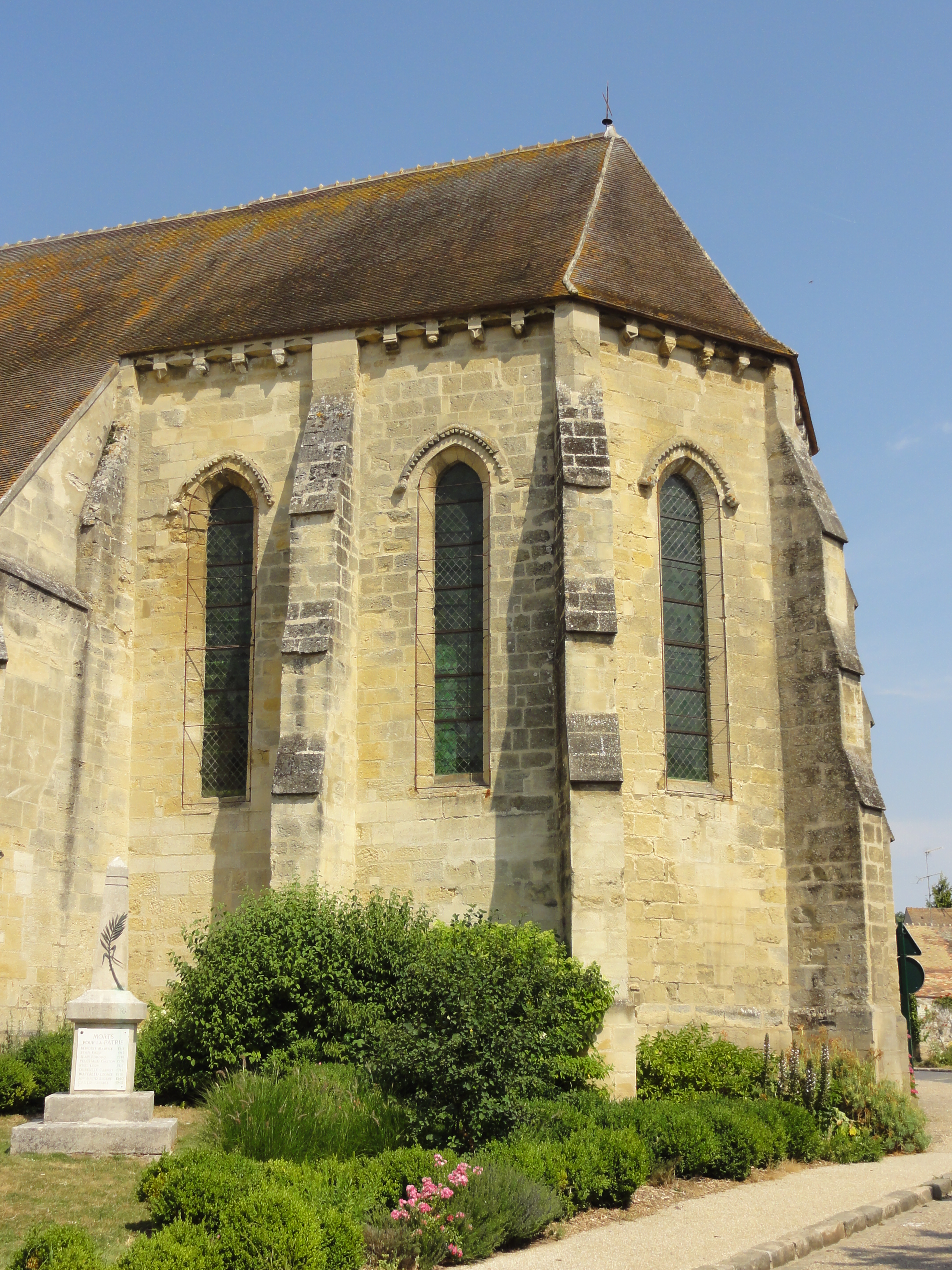 Église Saint-Gildard de Longuesse (voir titre).